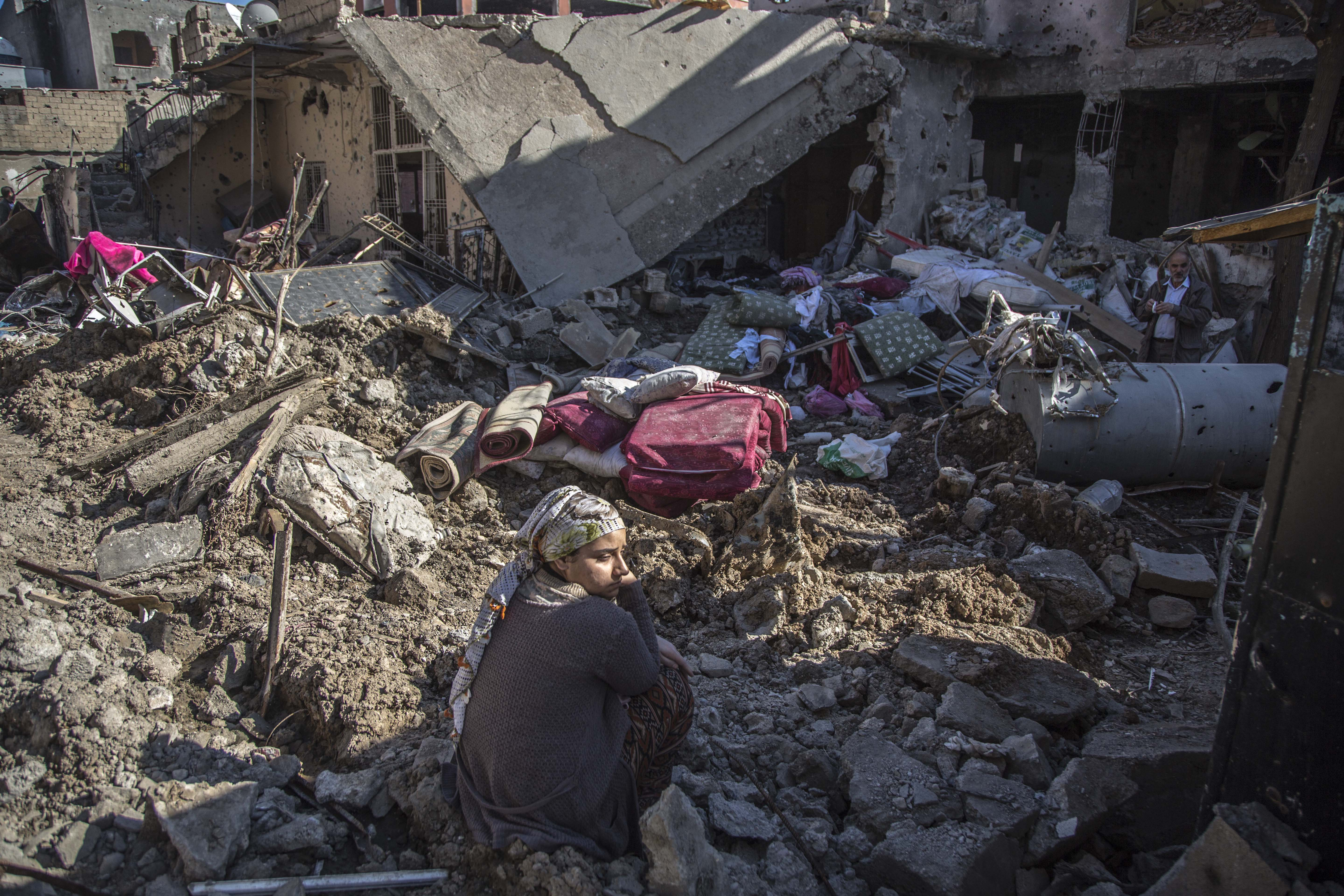 Cizre çatışmaları yıkılan evinin başında bir kadın, 2 Mart 2016